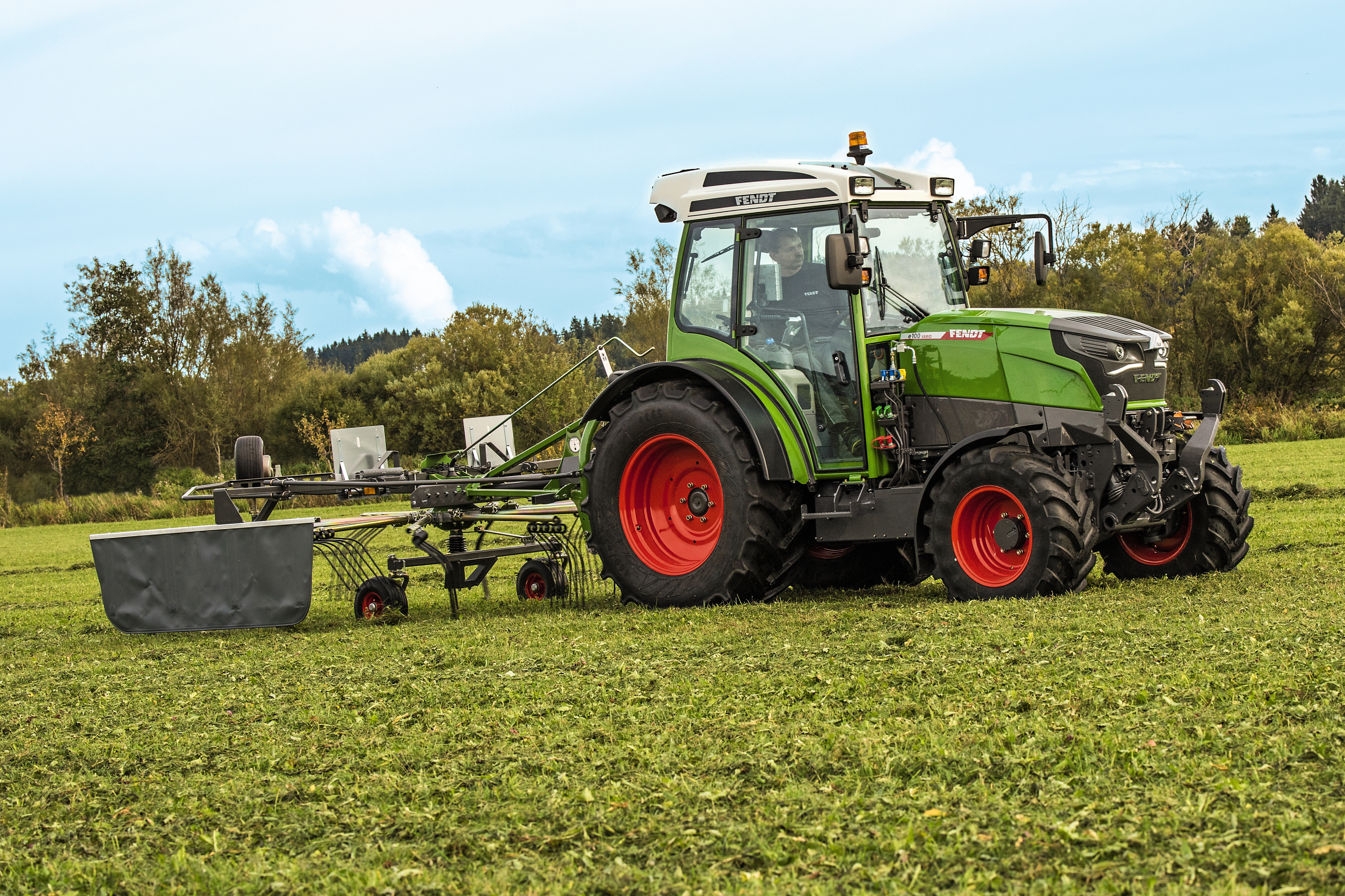 Fendt e100 Vario